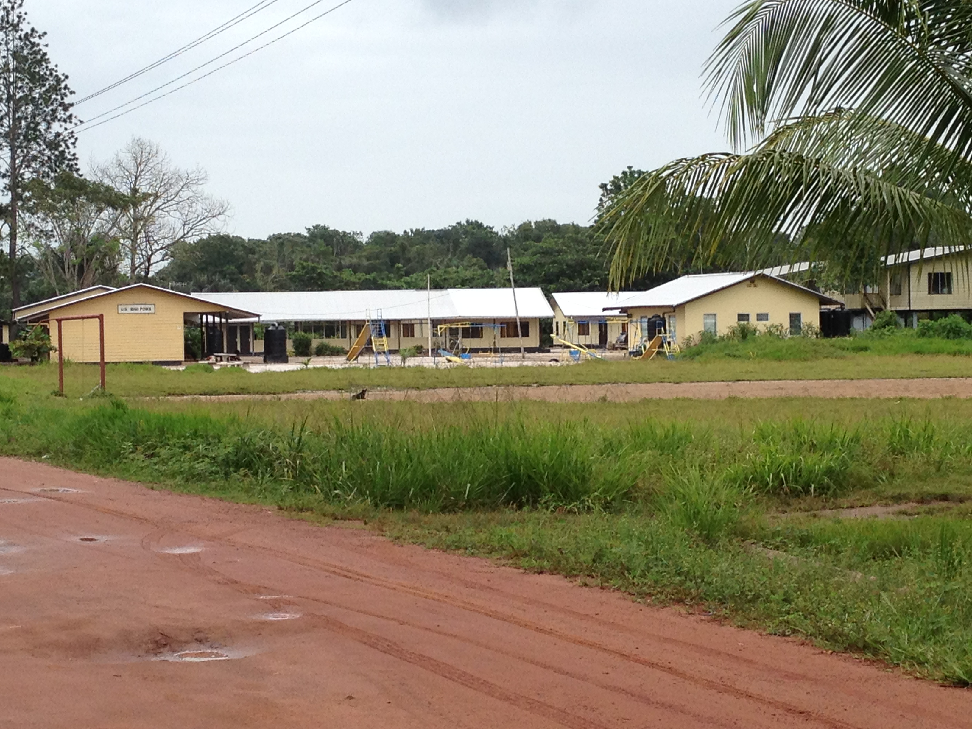 De nieuwbouw van de lagere school in Bigi Poika